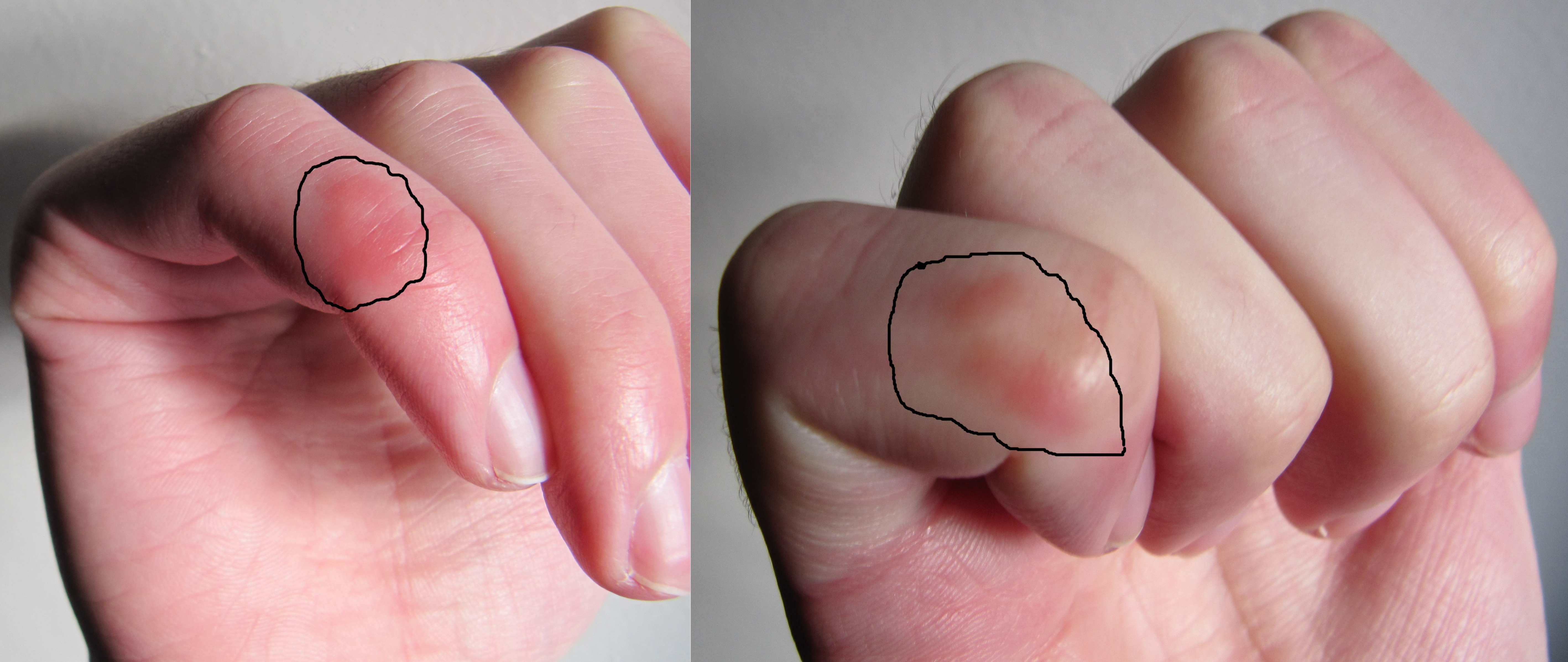 Température comprise entre 11,6 à 12,4 °C au niveau des mains, le 5 novembre 2016. Absence de vent et pas d’ensoleillement sur les mains. Tout bien couvert donc sensation d'avoir chaud partout (pieds, corps, jambes…) sauf froid aux 2 mains qui sont sans gans (4 épaisseurs : corps et jambe. 1 paire de chaussette qui remonte jusqu'en haut des mollets, chausson, 1 bonnet, 1 écharpe) sauf froid aux 2 mains découvertes. La main est restée des heures sur la souris pour surfer sur le web entre 6 à 20h. À 6 heure, le petit doigt était normal puis à 17 heures légère sensation d'envie de caresser le petit doigt car dès 17 heure le doigt est devenu rouge (effet de l'air de 12 °C sur la peau en 11 heures). Ça serait dès que la température est inférieure à 14,3 °C que ça entraînerait un rougissement de la peau malgré d'avoir chaud partout ailleurs. La température de début de risque de rougissement est très inférieure à 14,3 °C avec des gans.